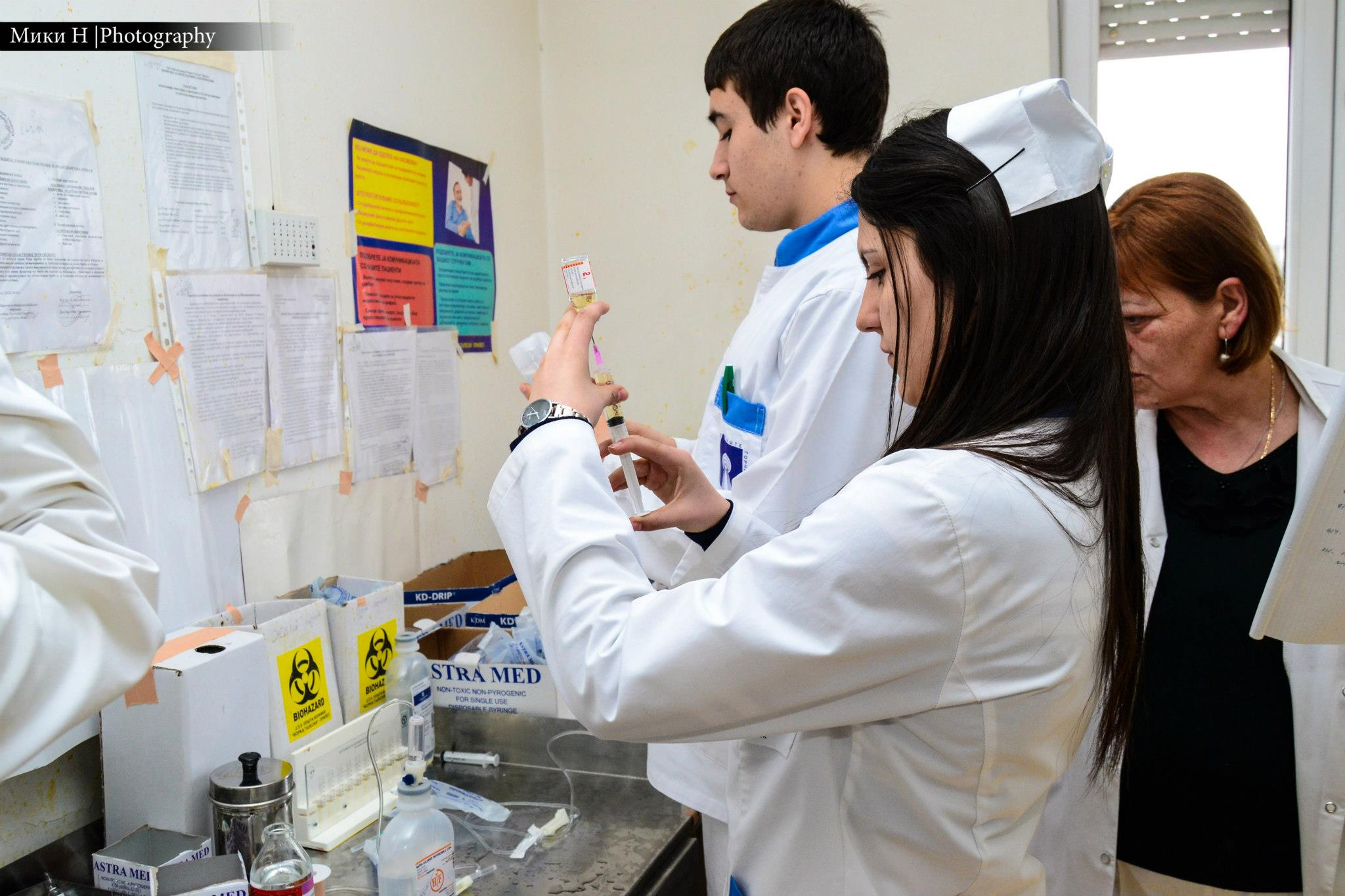 Медицинска сестра техничар